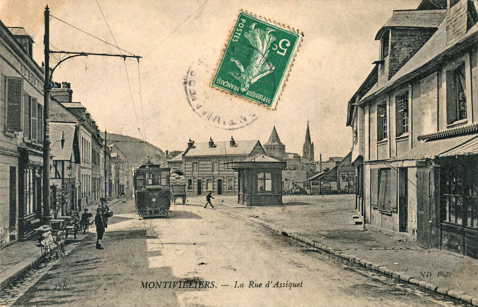 Carte postale ancienne éditée par ND, n°278 : MONTIVILLIERS - La rue d'Assiquet